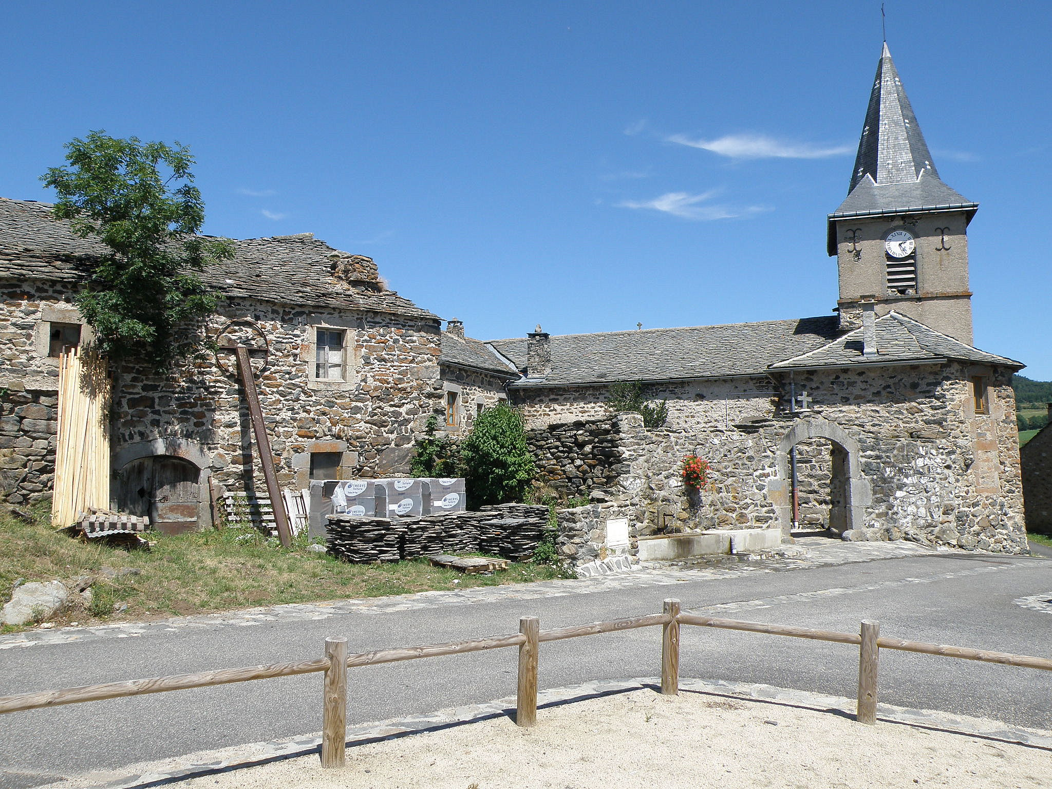 Champclause, comm. de la Haute-Loire, France (Auvergne). Village de Boussoulet : église et presbytère.